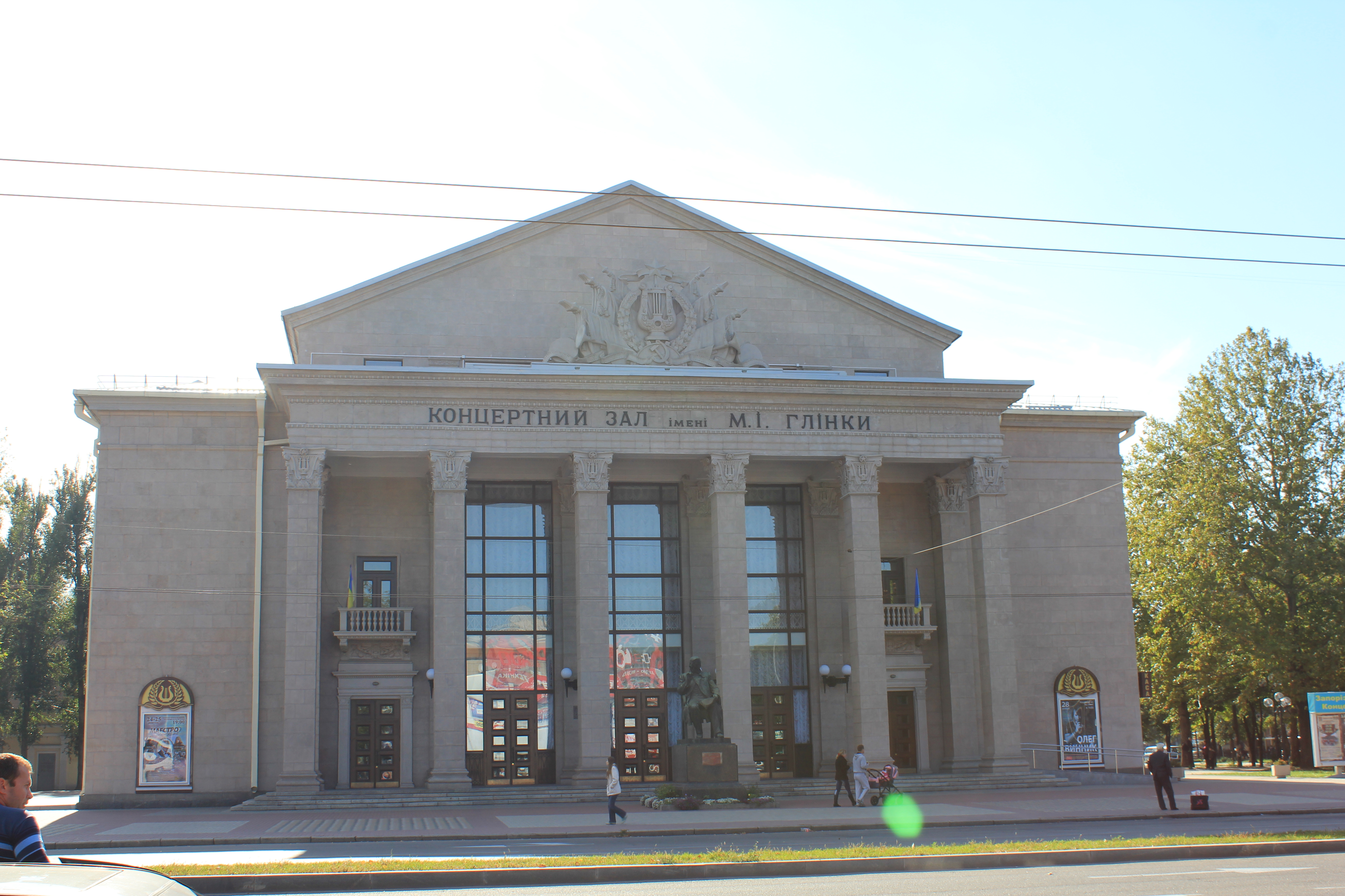 Вікі любить пам'ятки, м.Запоріжжя